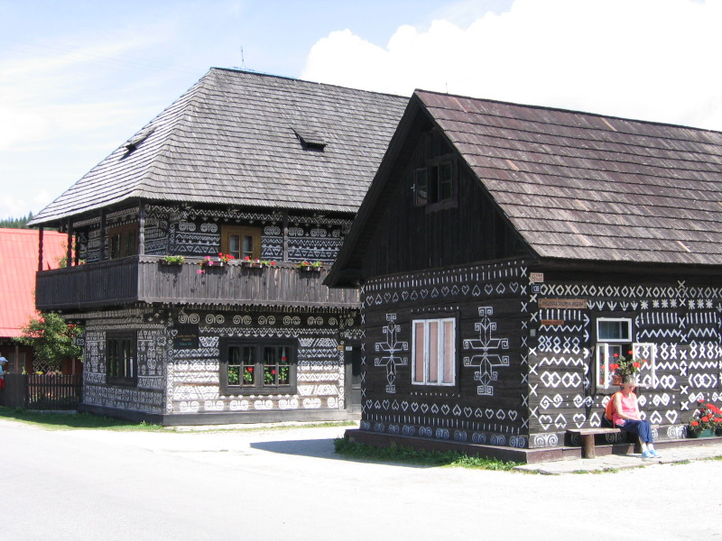 "Drevenica Ondreja Gregora" a Radenov dom, Čičmany